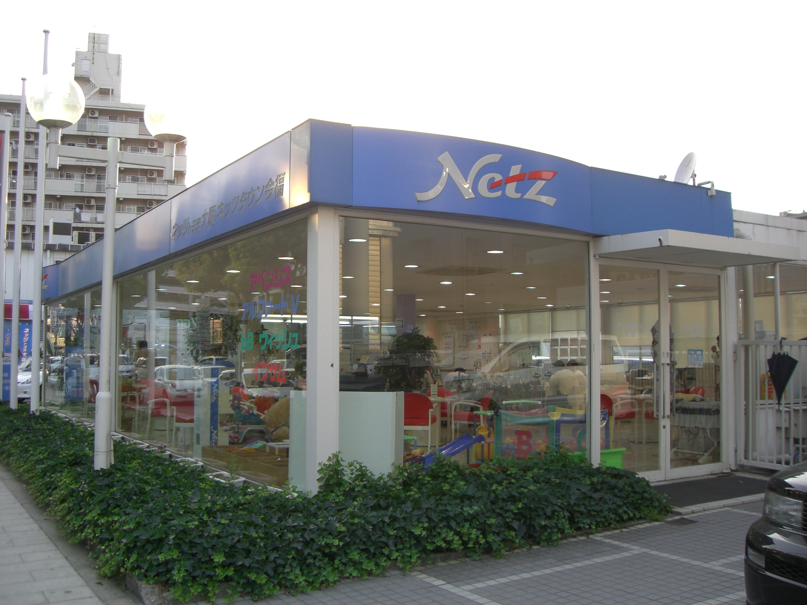 Nets TOYOTA